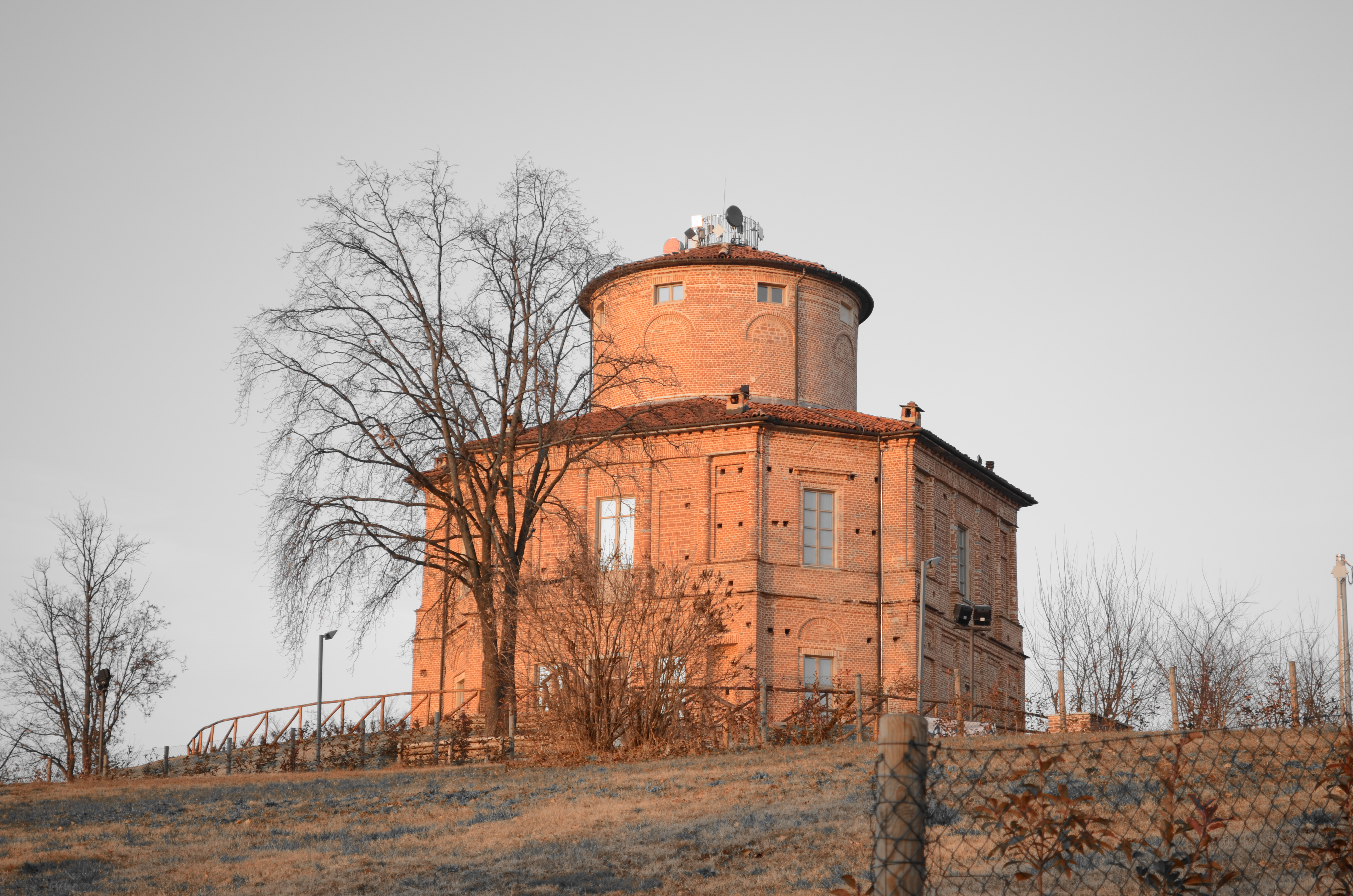 Zizzola This is a photo of a monument which is part of cultural heritage of Italy.